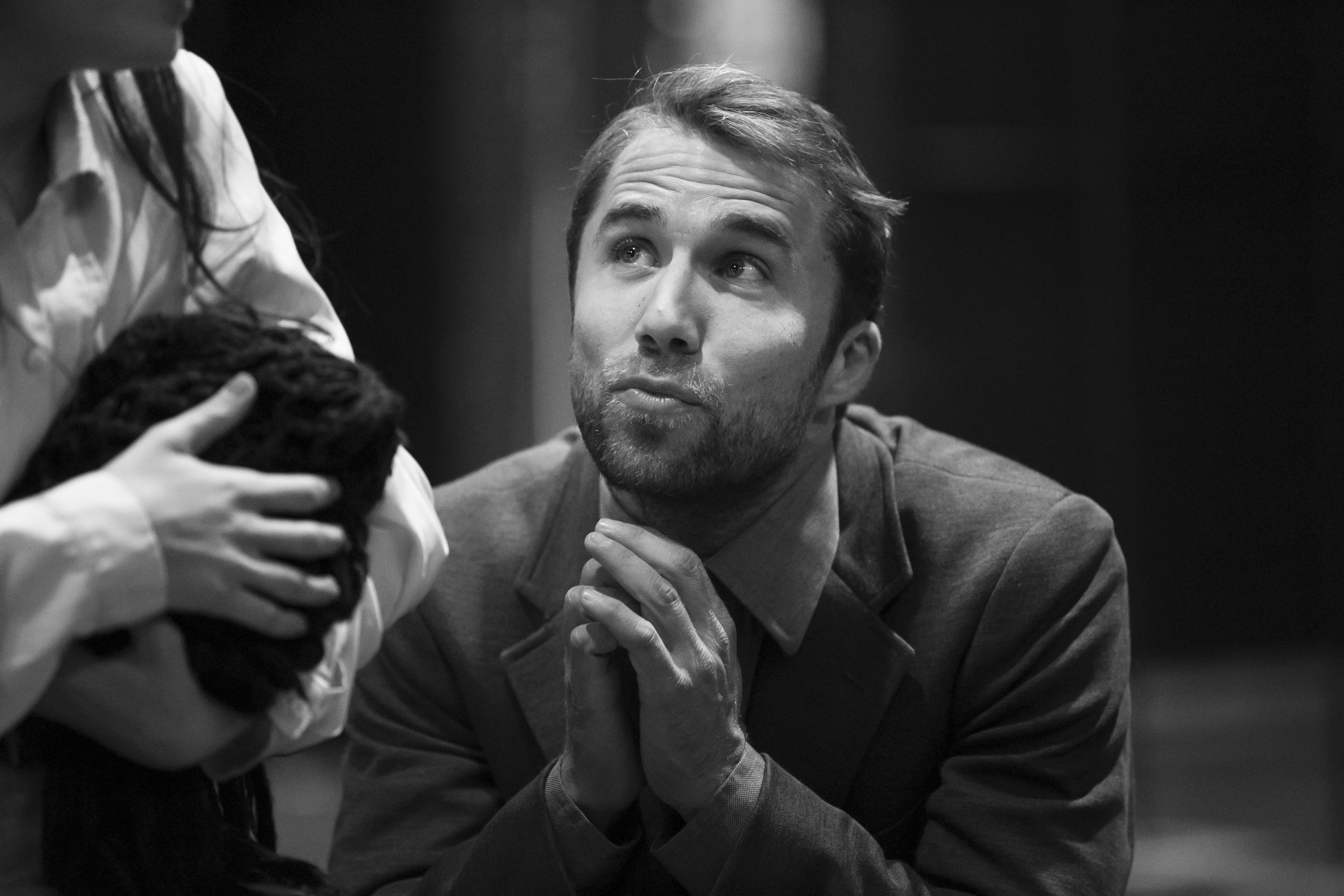 הכתה שלנו